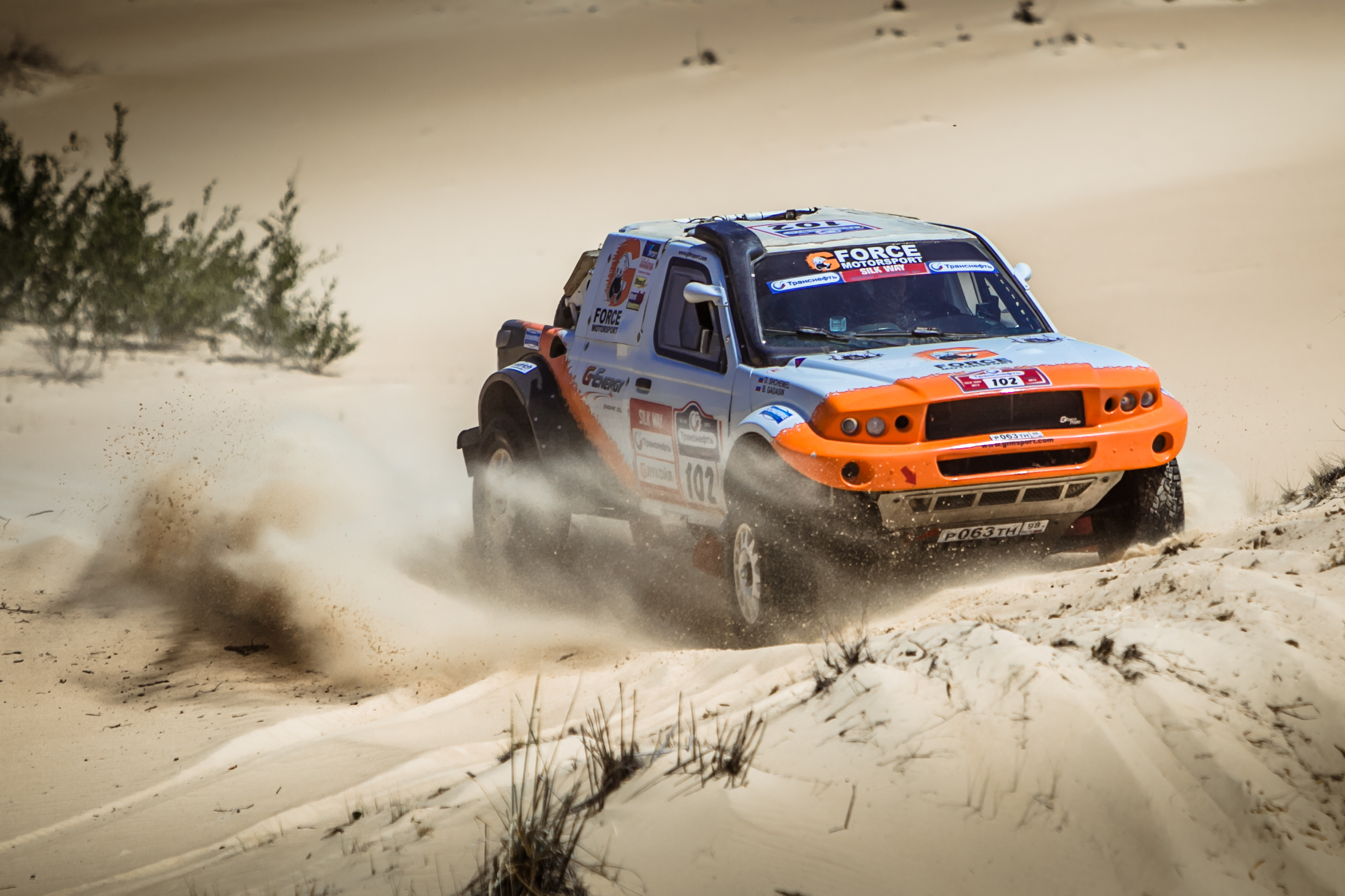 Победитель ралли-марафона "Шелковый Путь 2012" Борис Гадасин